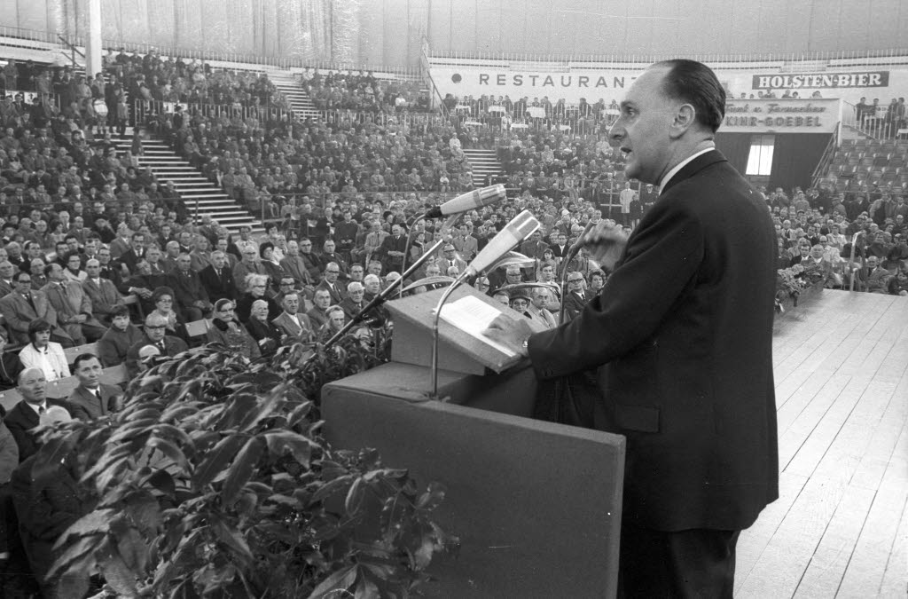 Es spricht Georg Neemann, Mitglied des Bundesvorstandes des Deutschen Gewerkschaftsbundes (DGB).